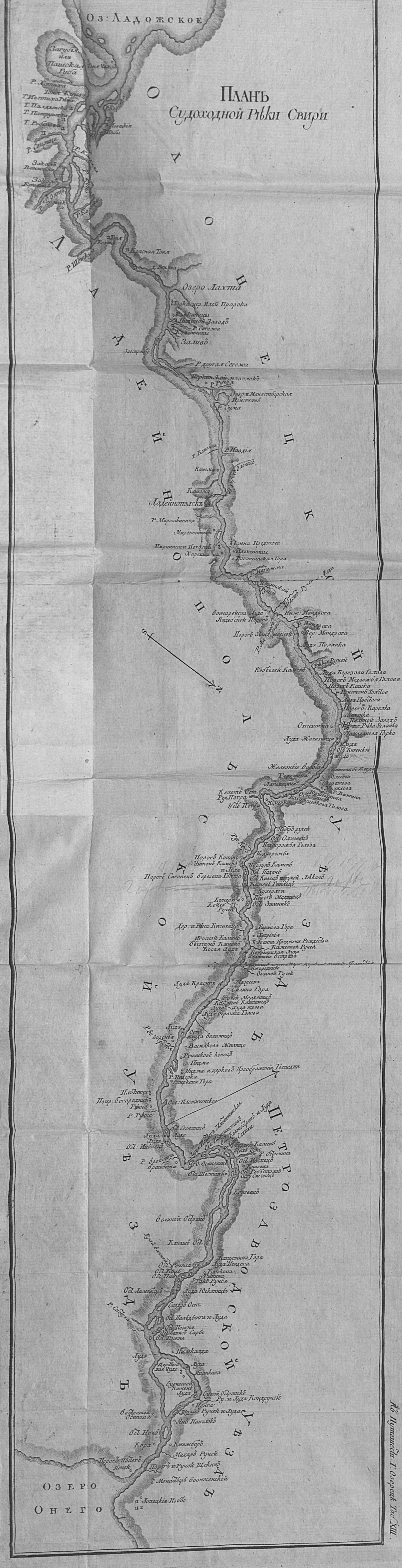 "План Судоходной Реки Свири" Озерецковский, Николай Яковлевич "Путешествие по озерам Ладожскому и Онежскому" 1792 год.